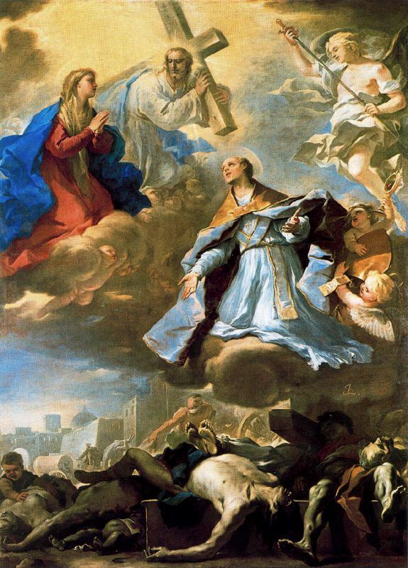 Dipinto (olio su tela) San Gennaro intercede presso la Vergine, Cristo e il Padre Eterno per la peste.